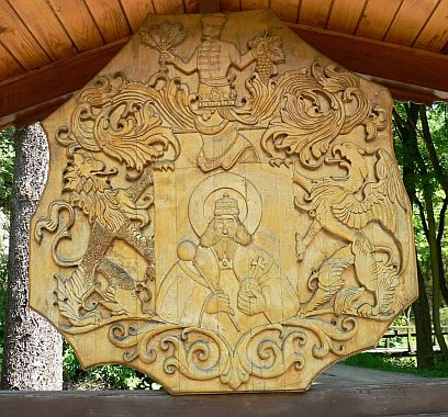 A képen látható fafaragvány Lillafüreden, a város szélén, egy alagút előtt található, Miskolc címerét ábrázolja